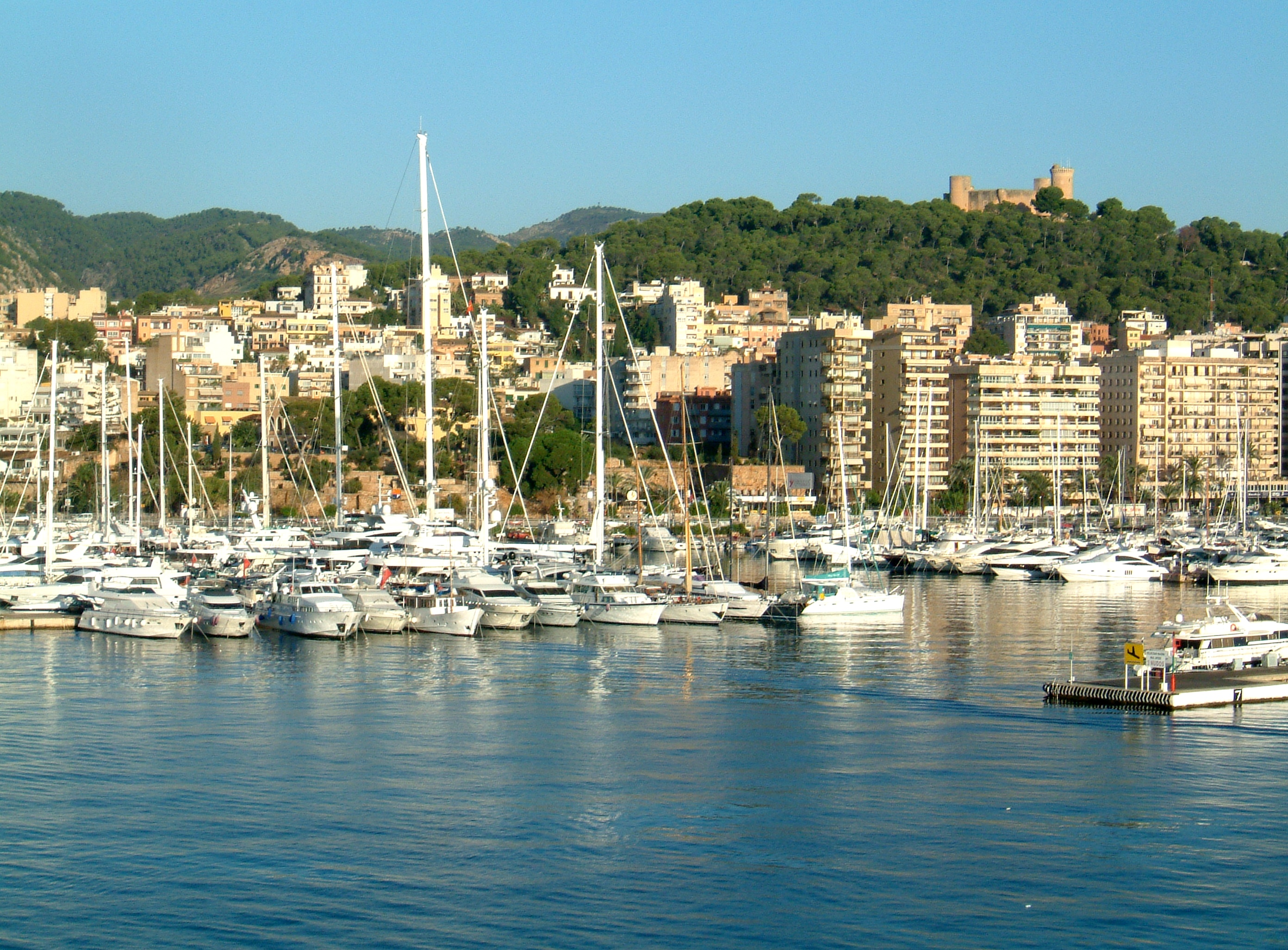 Palma